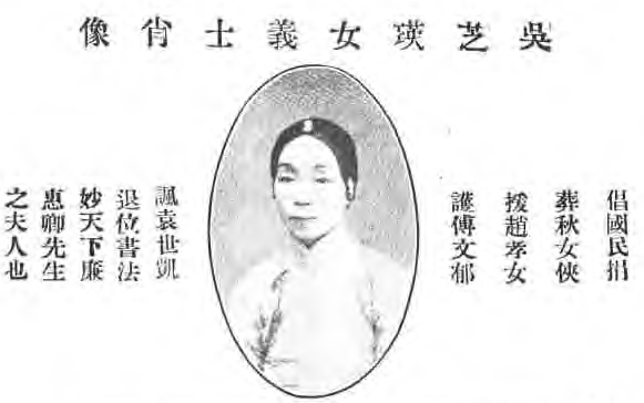 治家全書圖像